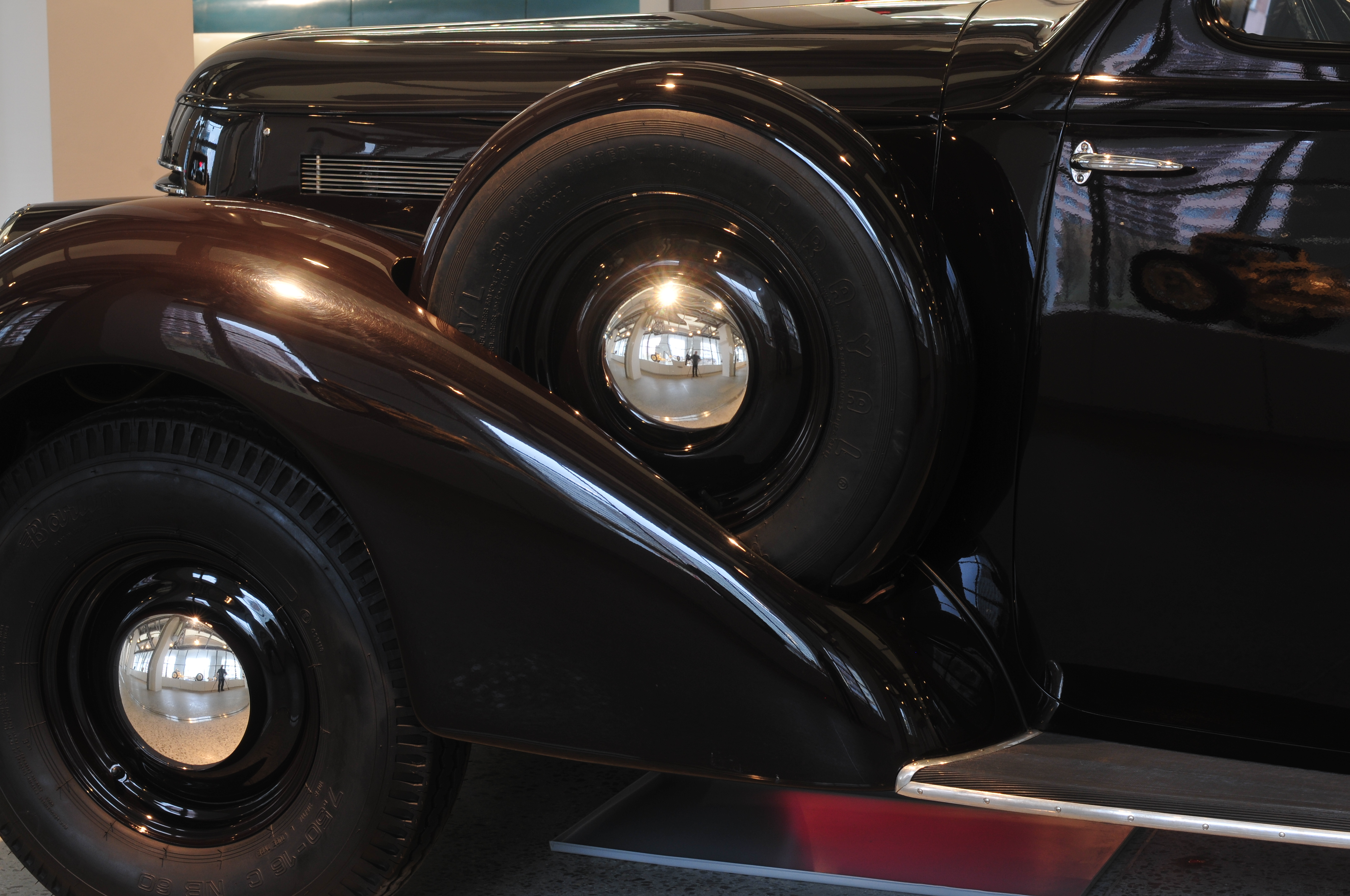 Fototermin Škoda Museum Mladá Boleslav 2013 Fototermin Škoda Muzeum 5. April 2013 in Mladá Boleslav This work is free and may be used by anyone for any purpose. If you wish to use this content, you do not need to request permission as long as you follow any licensing requirements mentioned on this page.